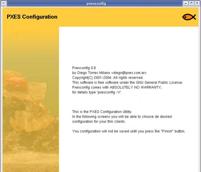 PXES configuration screen